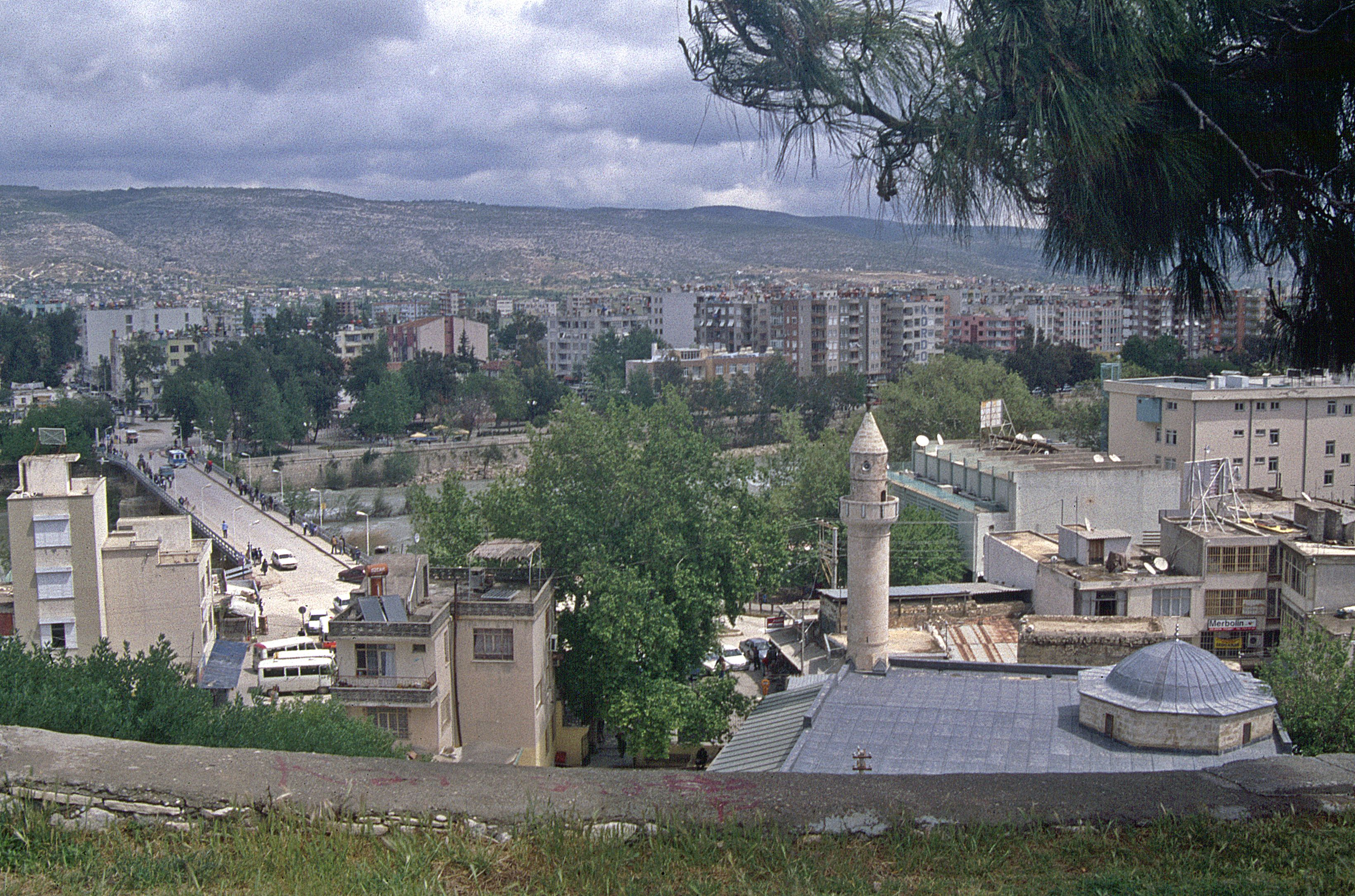 Blick auf Silifke